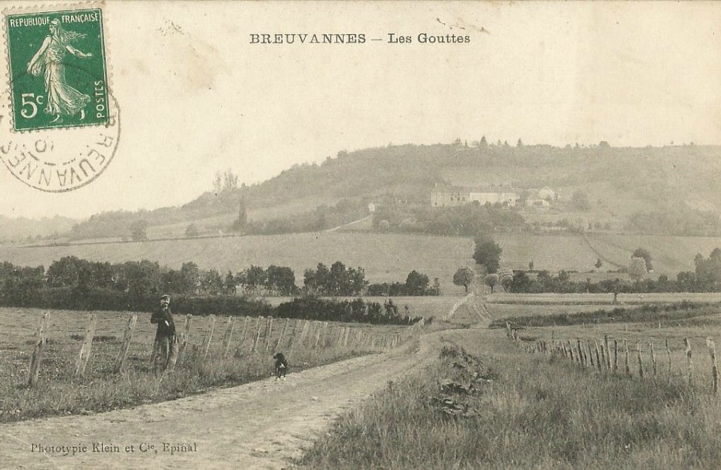 Carte postale: vue du hameau des Gouttes.